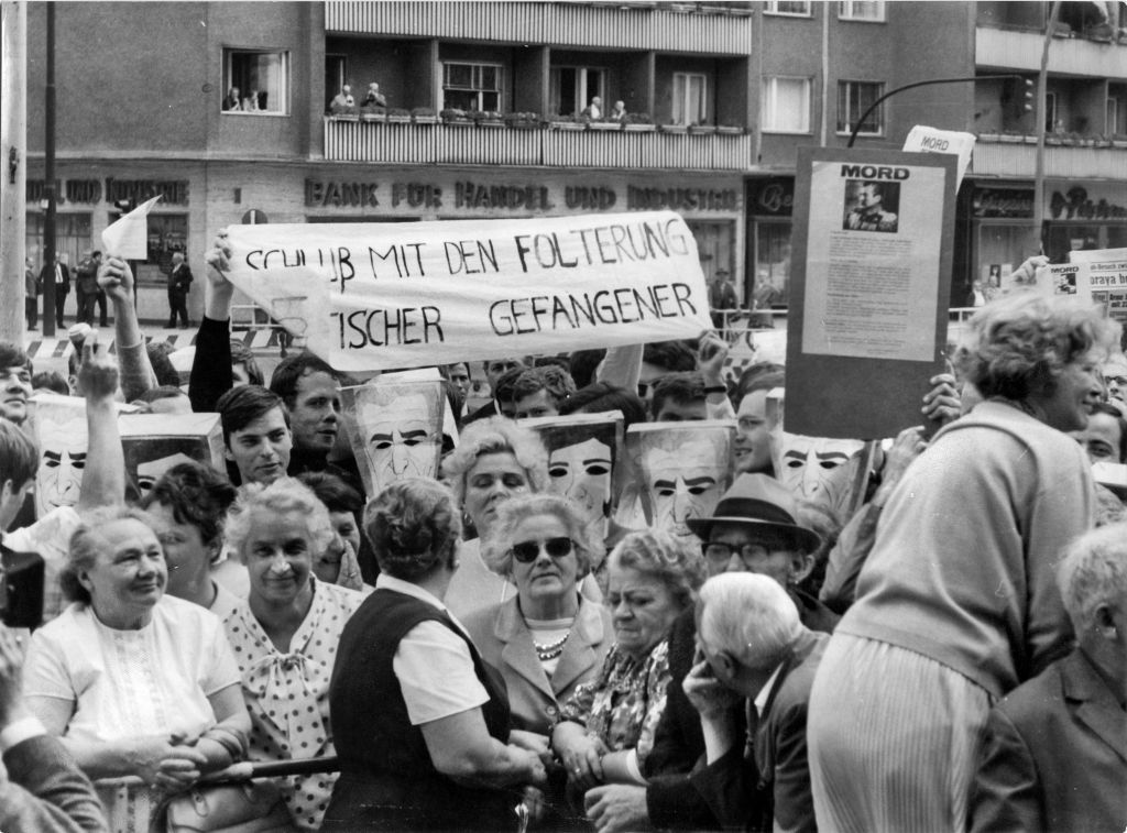 Ludwig Binder: Studentenrevolte 1967/68, West-Berlin; veröffentlicht vom Haus der Geschichte der Bundesrepublik Deutschland